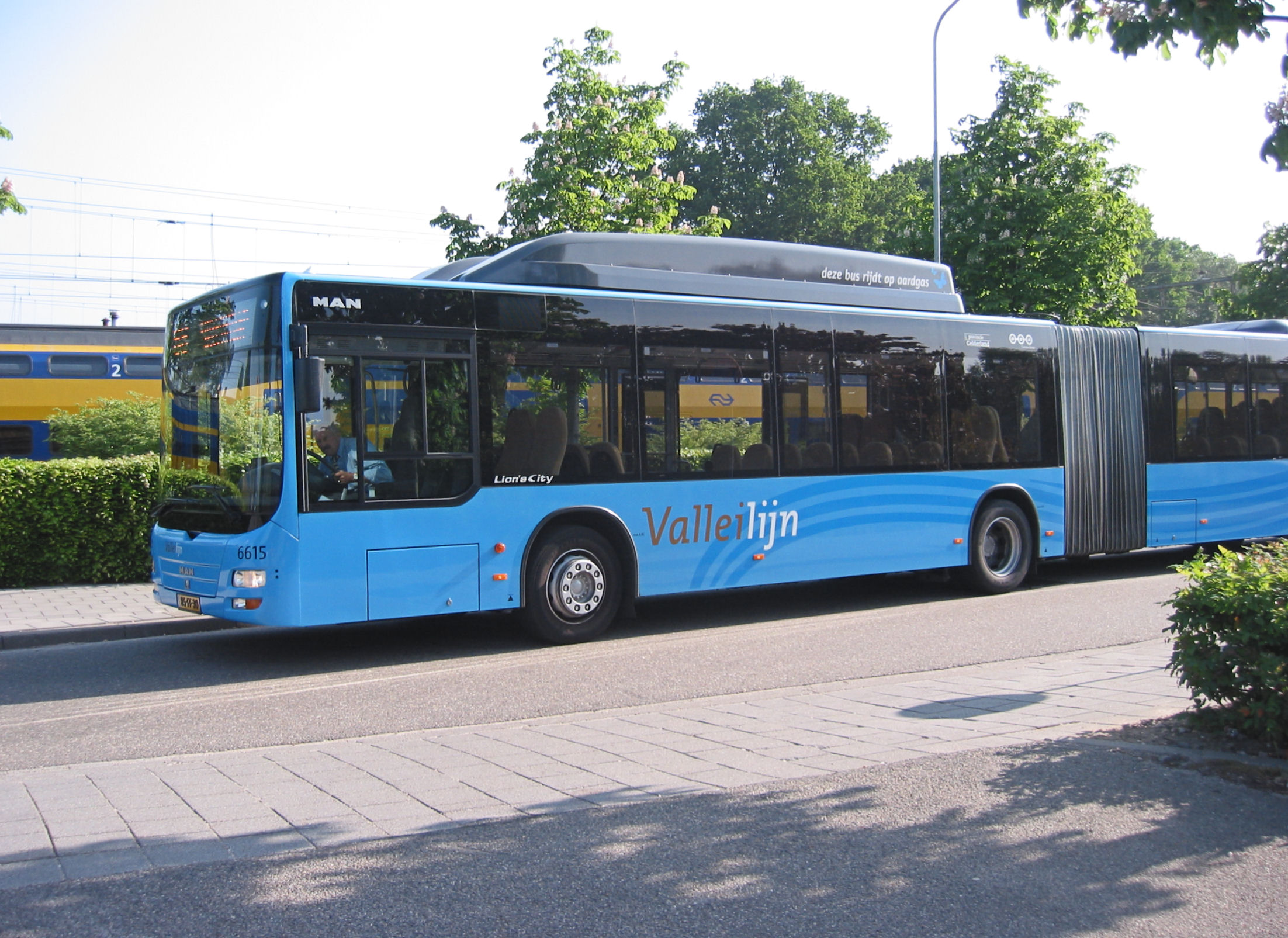 Station Ede-Wageningen bushalte valleilijn.